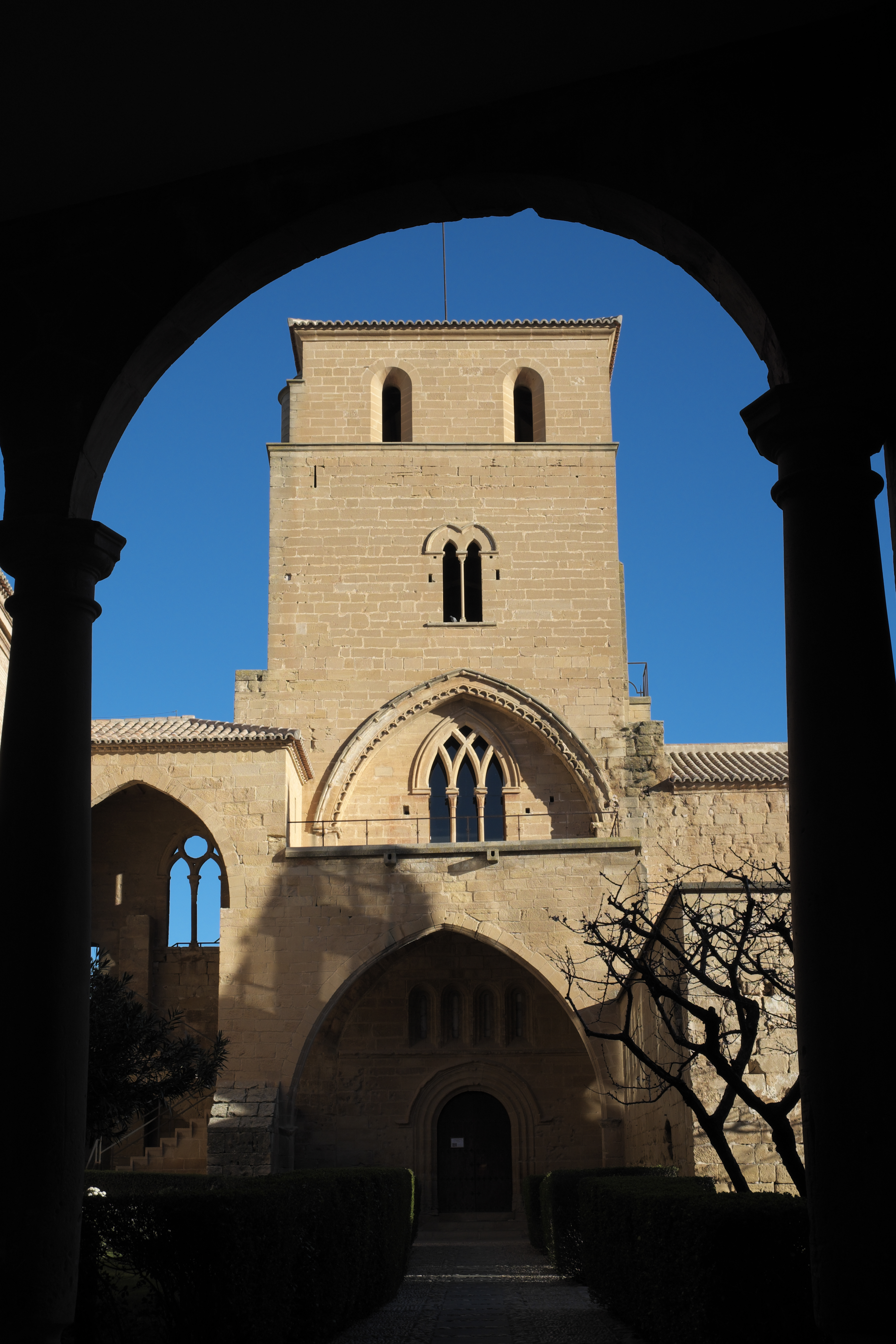 Castillo-Convento von Alcañiz in der Provinz Teruel (Aragonien/Spanien), Torre del homenaje